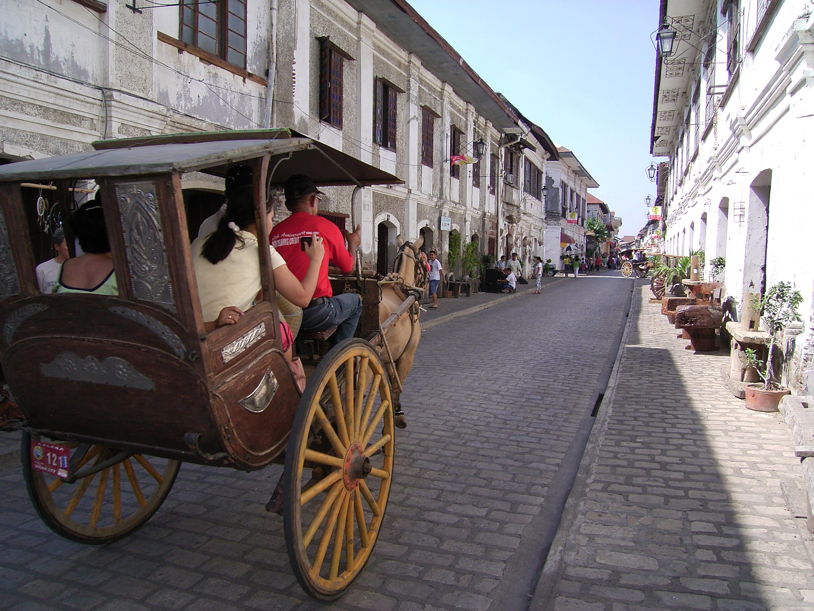 מראה בעיר ההיסטורית.